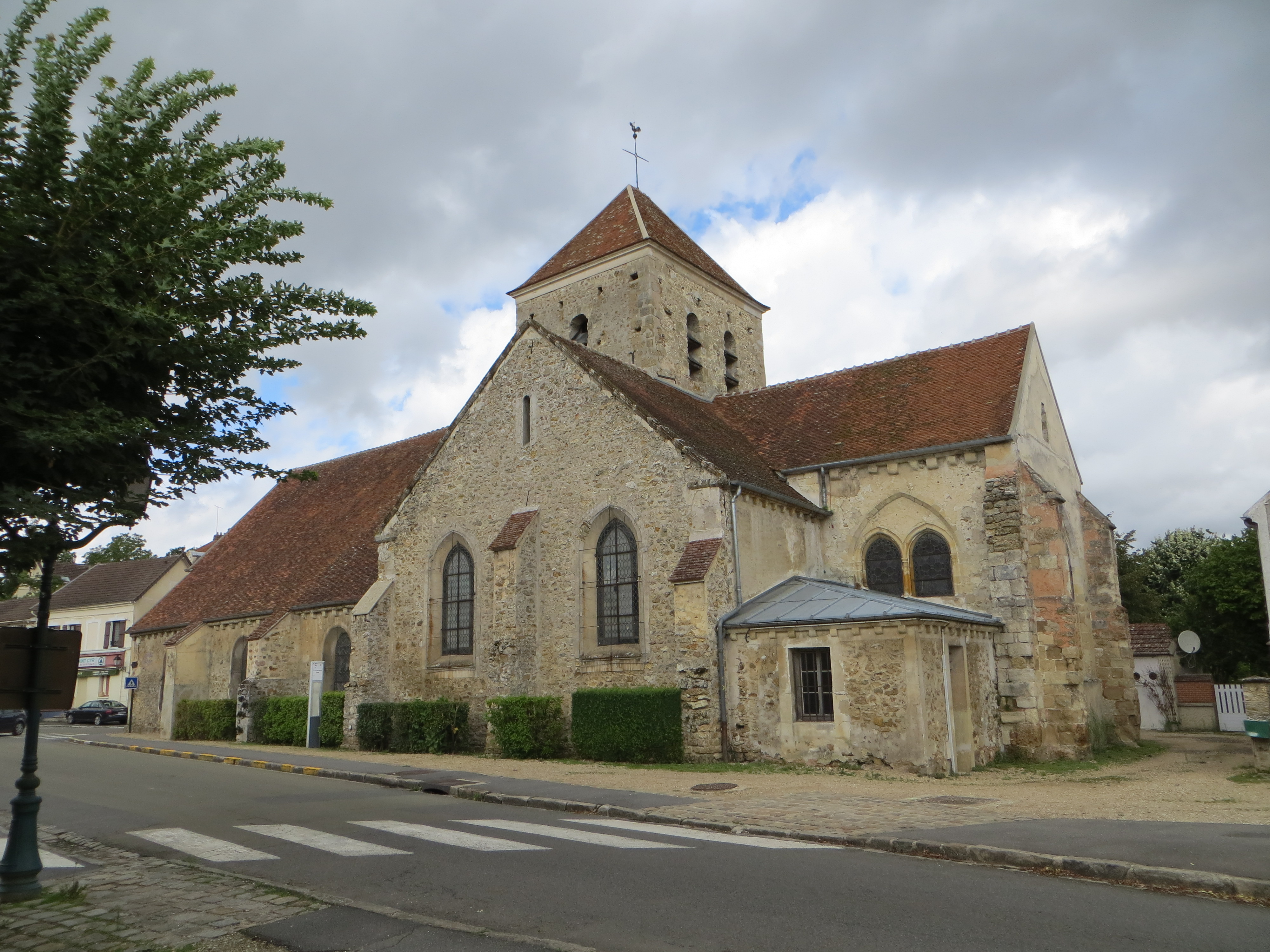 Vue de l'église